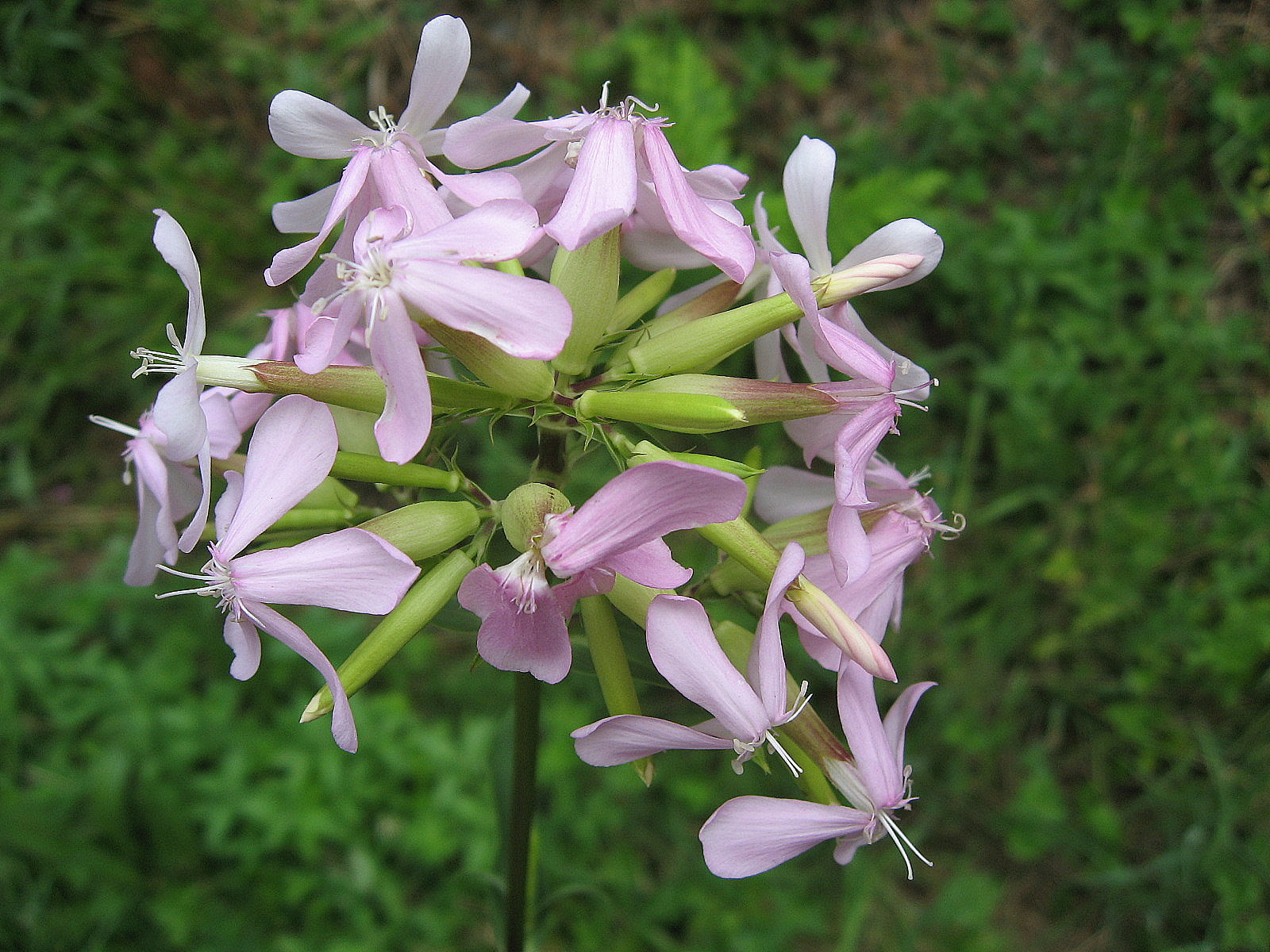 Gewöhnliches Seifenkraut (Saponaria officinalis)